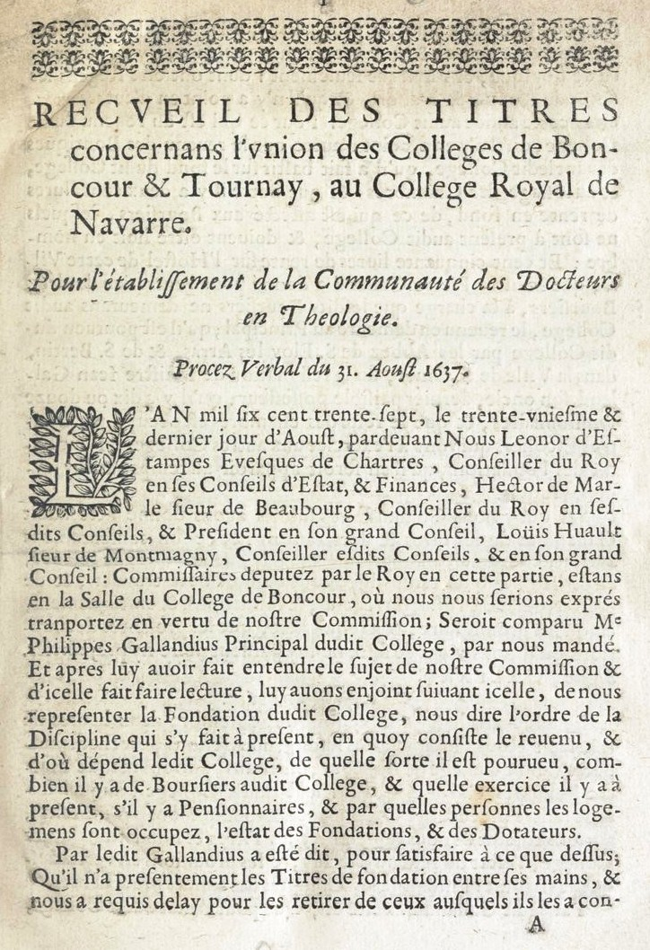 Recueil des titres concernant l'union des collèges de Boncourt et Tournai au collège royal de Navarre... Procès verbal du 31 août 1637.